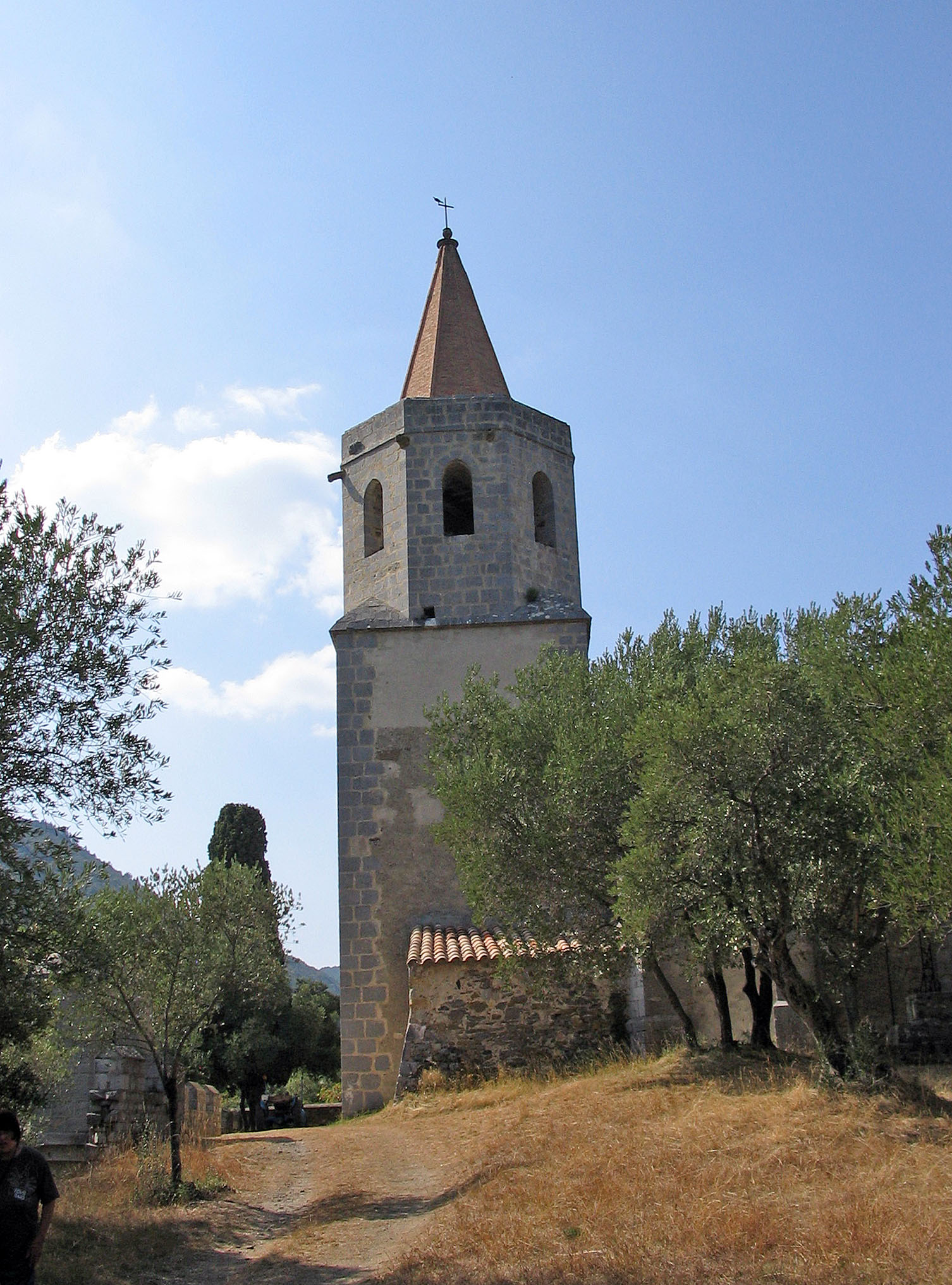 Notre Dame de Laval près de Caudiés de Fenouillet